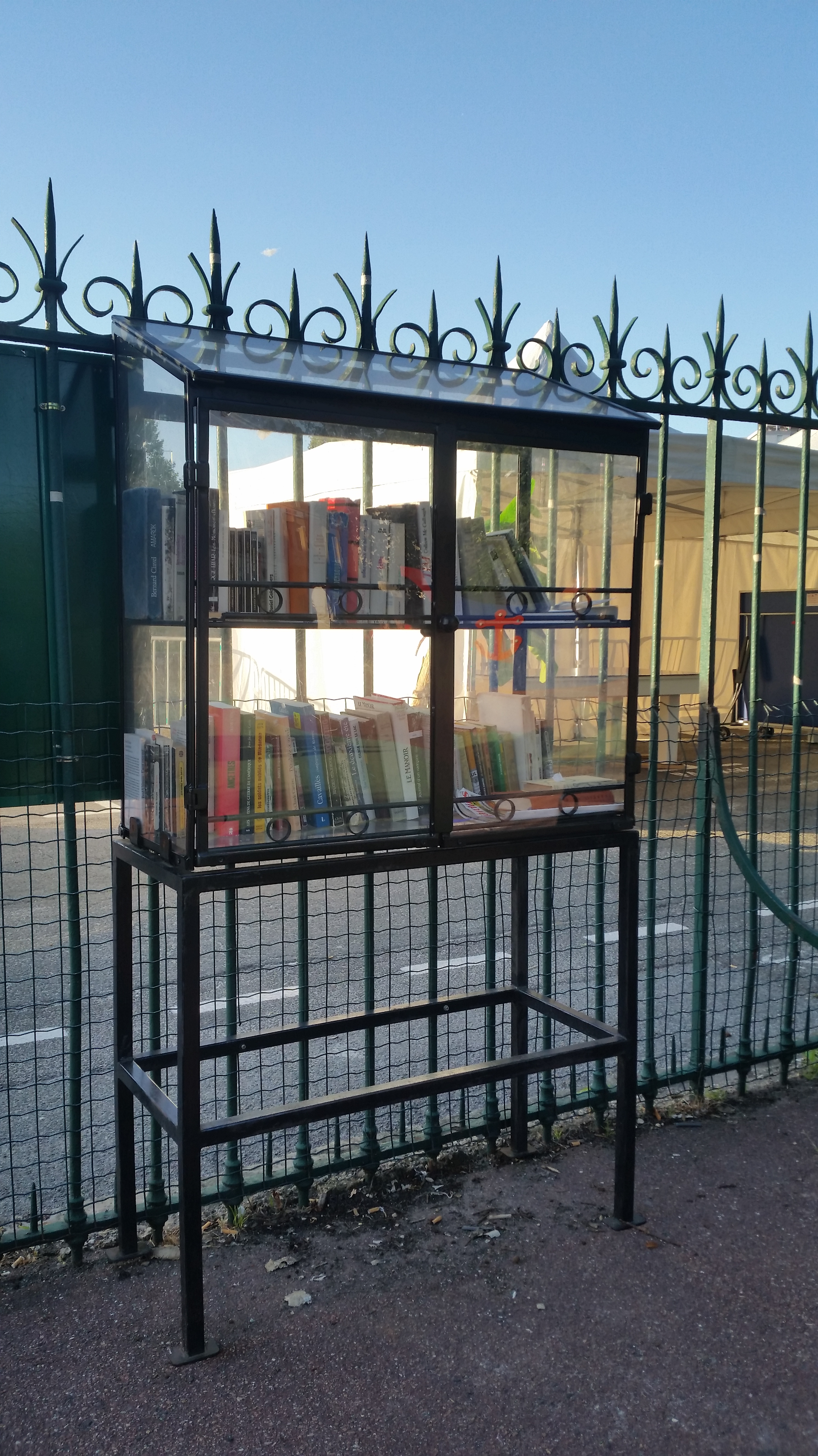 Coffre pour déposer ses livres sur les berges de la Marne à Lanny-Sur-Marne (77) en France